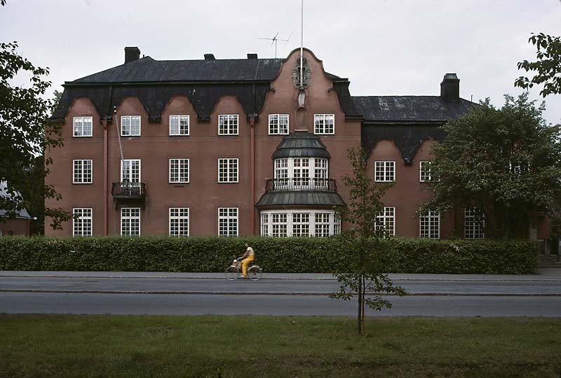 Byggnadsverk; Kårhus; Utbildning och vetenskap